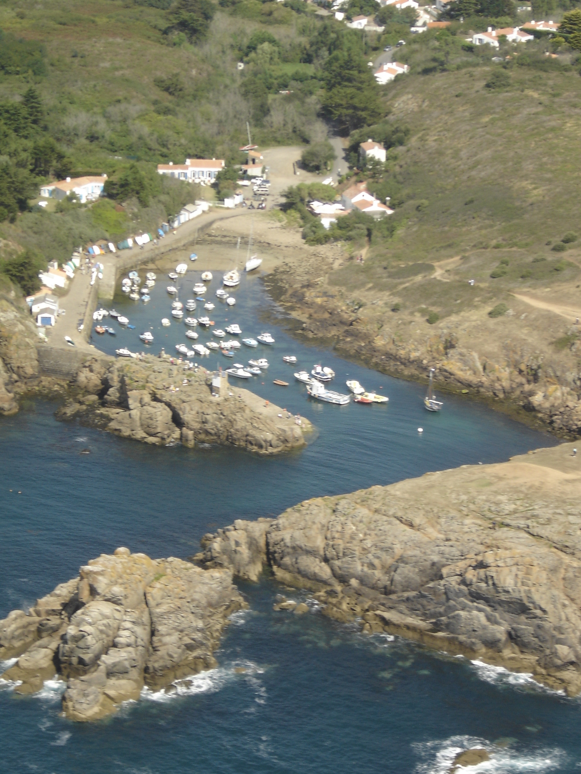 Une des phtos prises du Port de la Meule à l'île d'Yeu (Oya hélicoptère) pendant la saison 2006.